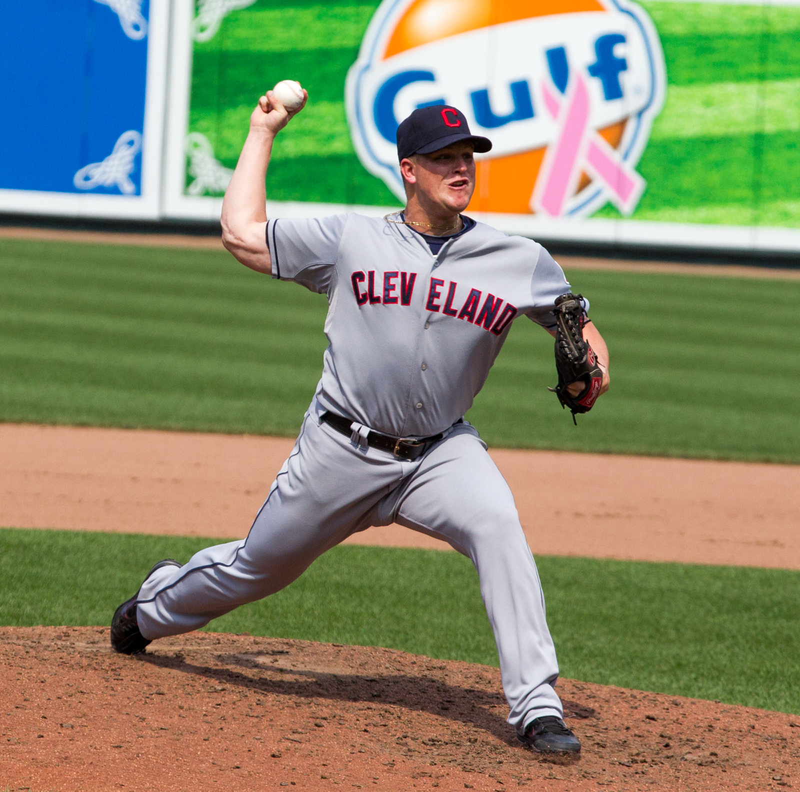 Vinnie Pestano